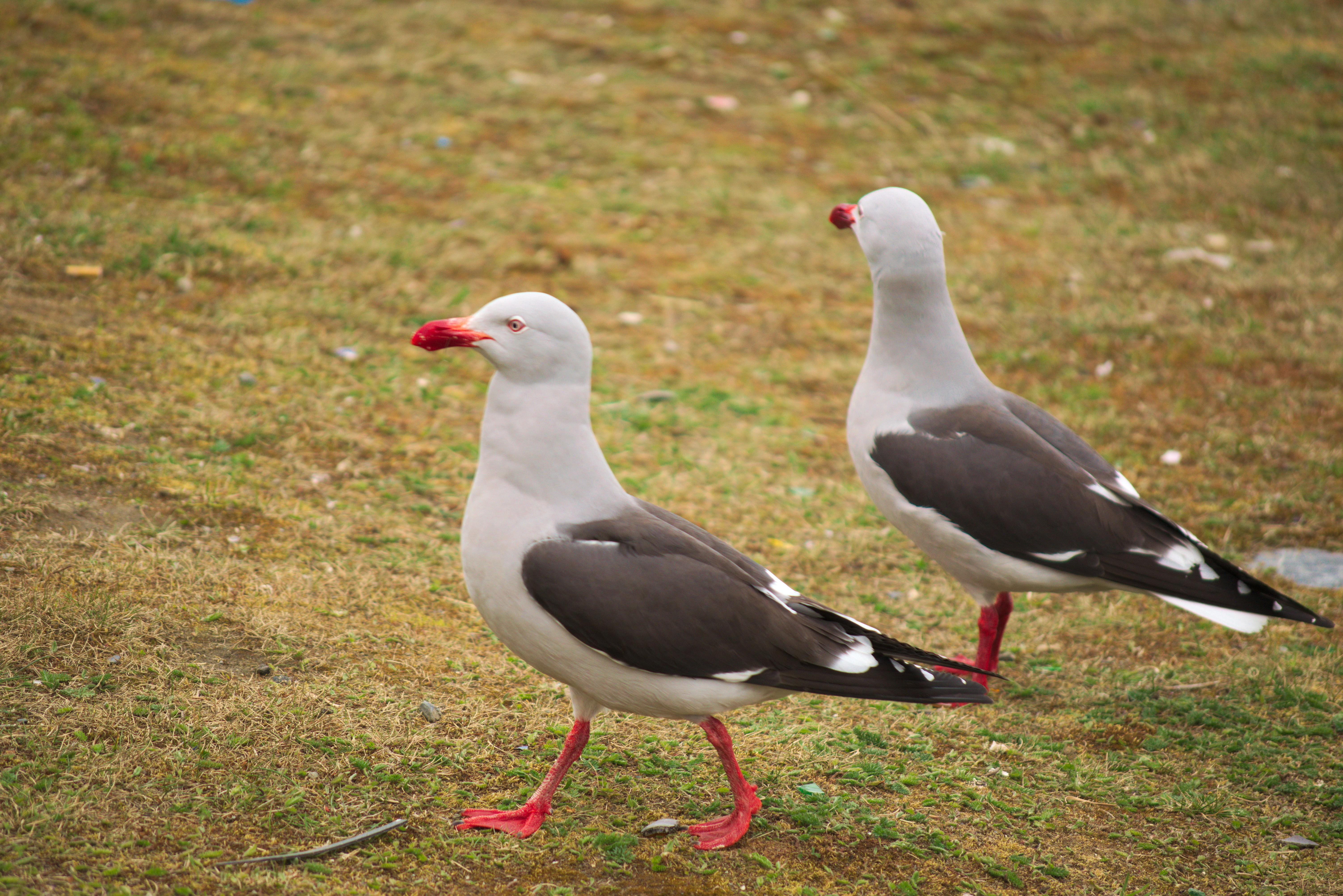 Pareja de gaviotas grises australes (Leucophaeus scoresbii) en la costa de Ushuaia (Argentina)